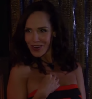 Sharis Cid in La Rosa de Guadalupe